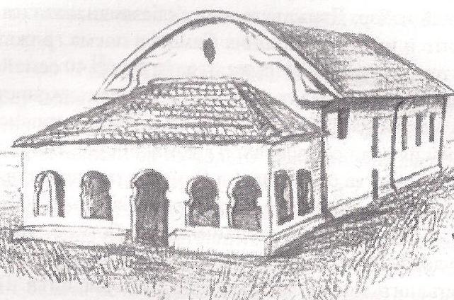 Черквата Свети Георги в Шишманово